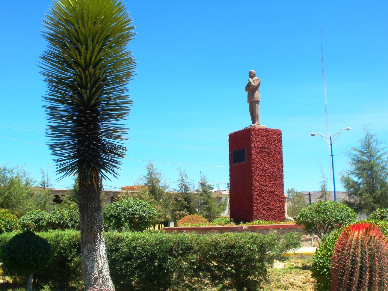 Glorieta Julian Carrillo